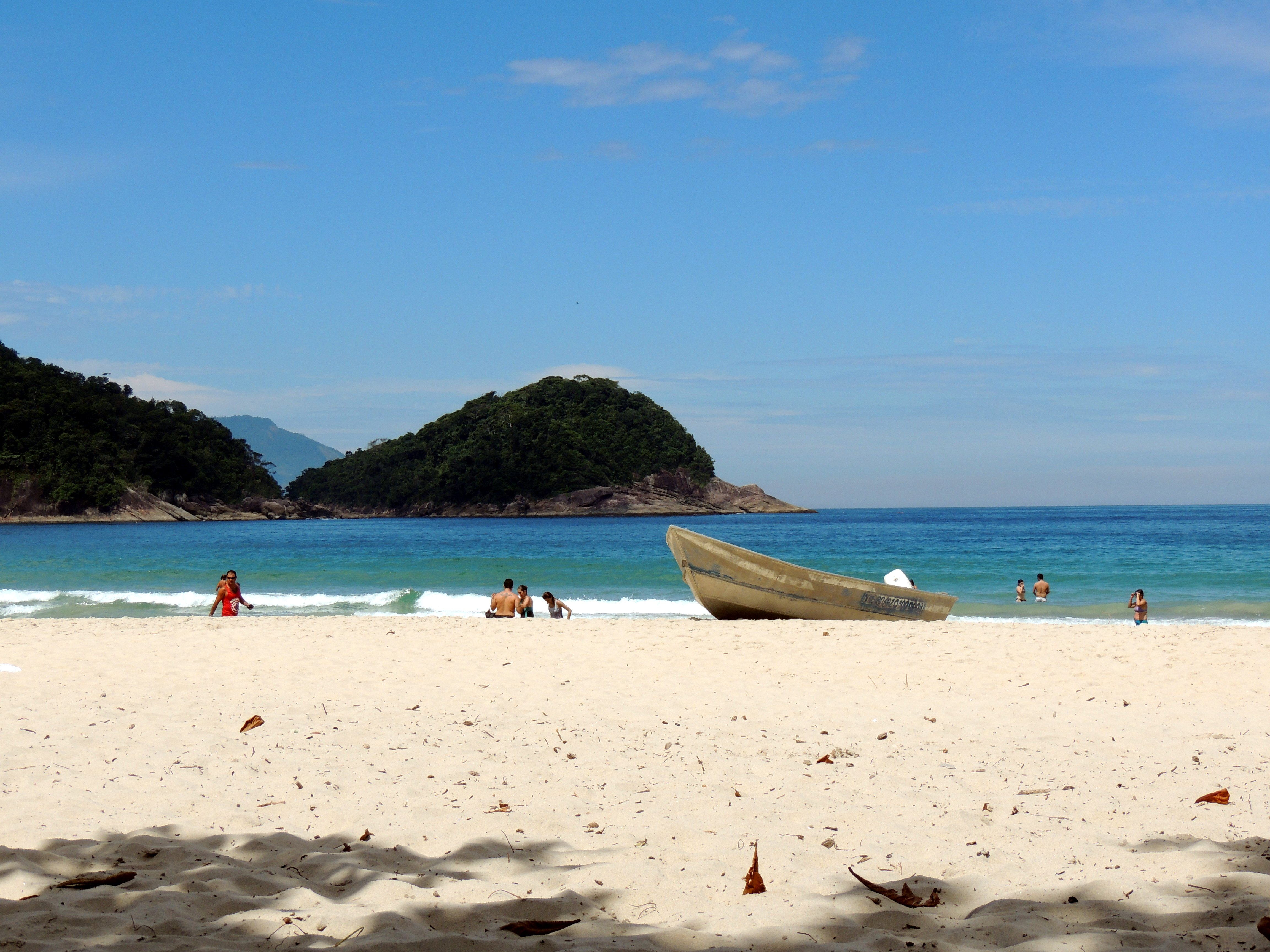 Praia do Caixa d'Aço em Trindade (Paraty-RJ)